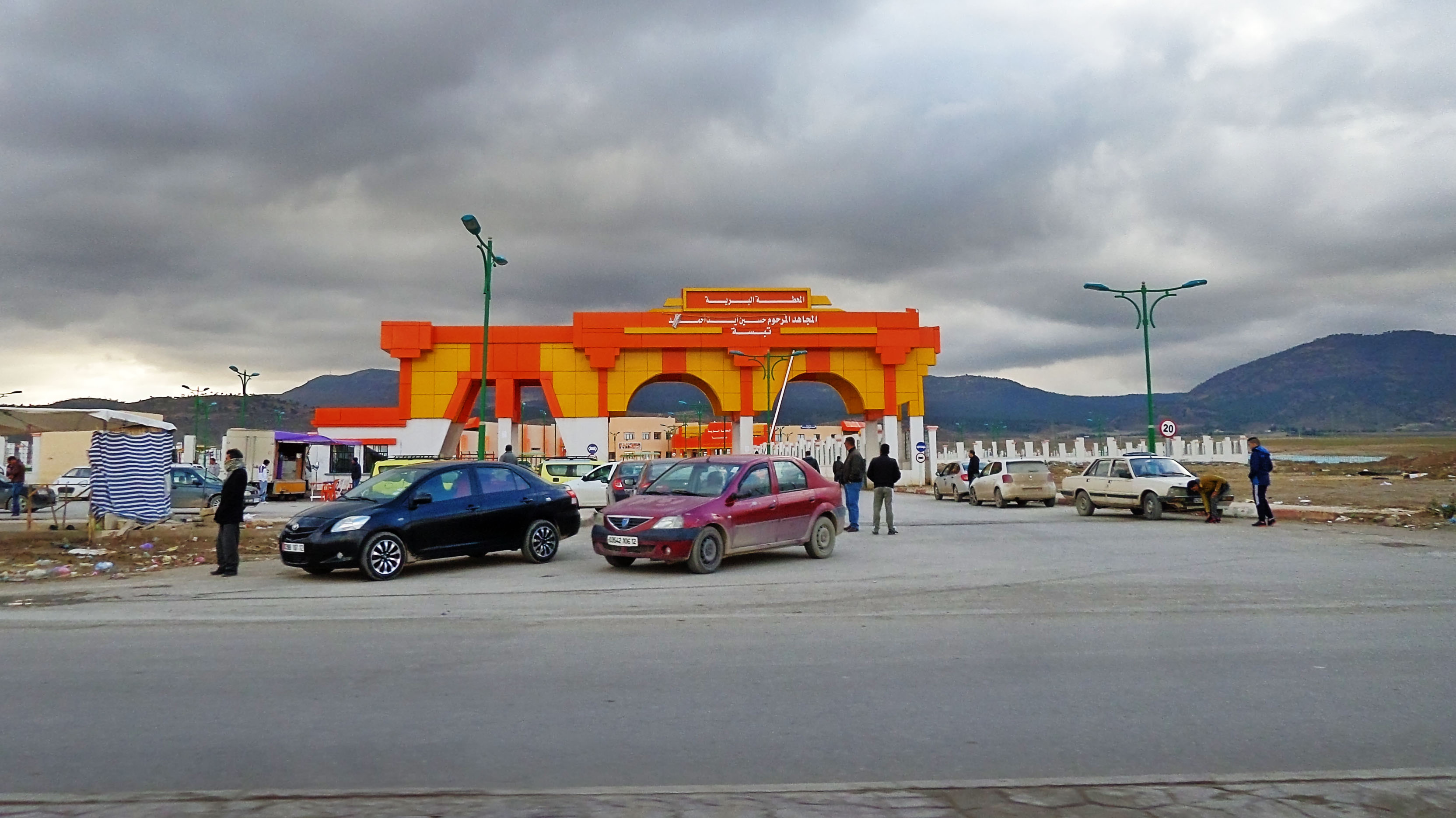 Gare routière de Tébessa المحطة البرية بتبسة حسين ايت احمد Wilaya de Tébessa ولاية تبسة